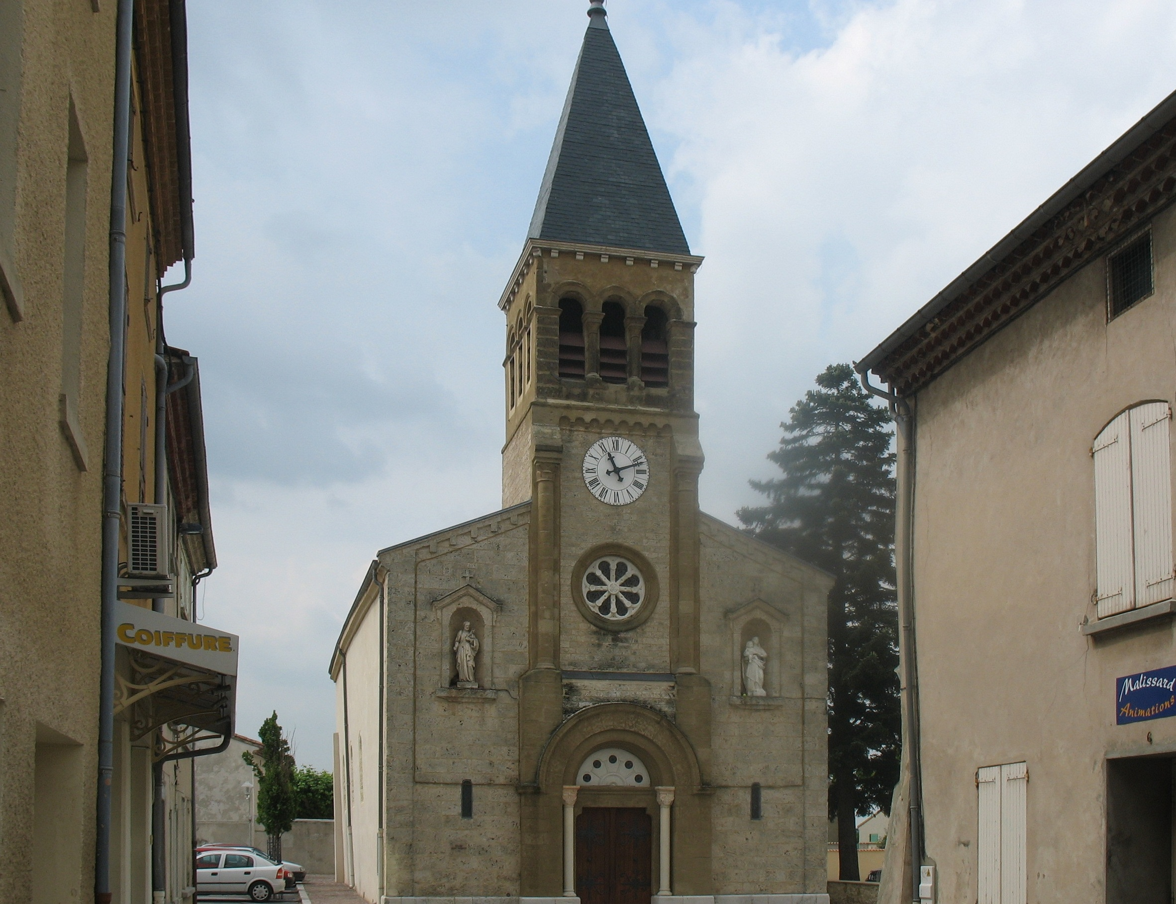 Eglise du village de Malisard